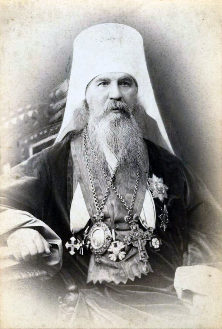 митрополит Санкт-Петербургский и Ладожский Палладий (Раев); во многих источниках ошибочно указывается, что это митрополит Питирим (Окнов)